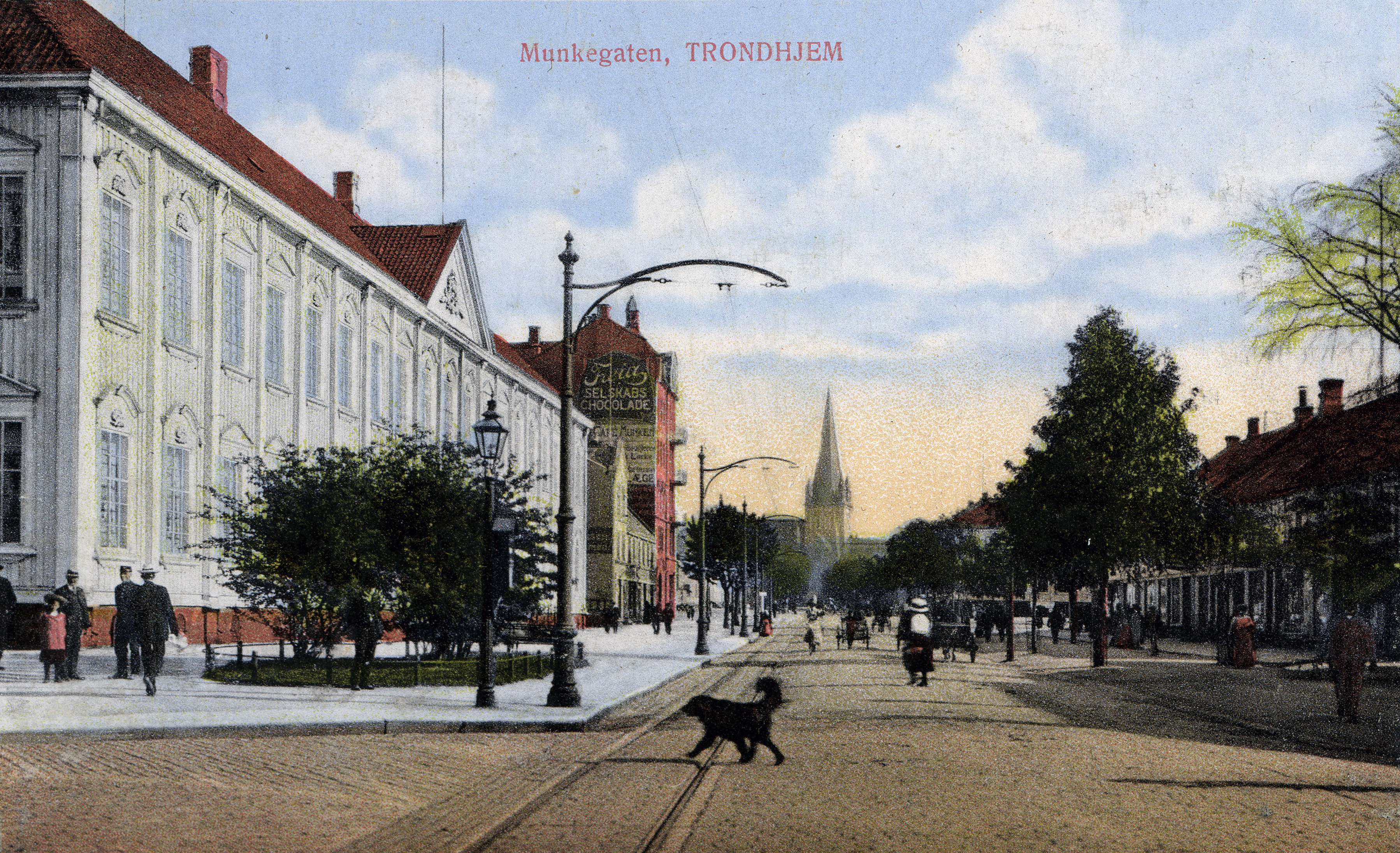 Format: Postkort. År: Tidlig 1900-tall, ca. 1910 - 1915. Foto: Ukjent.